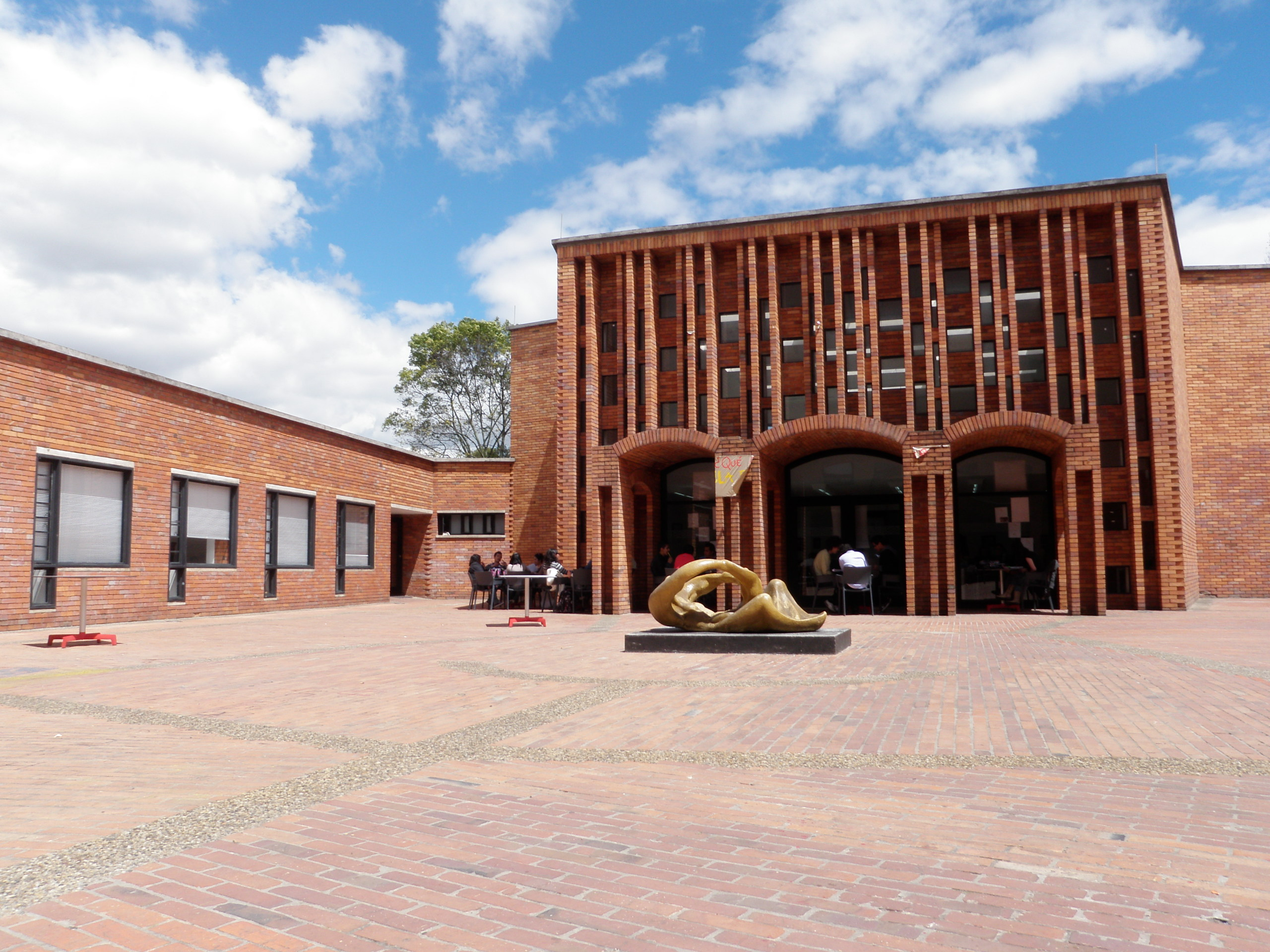 Universidad Nacional de Colombia. Facultad de Economía